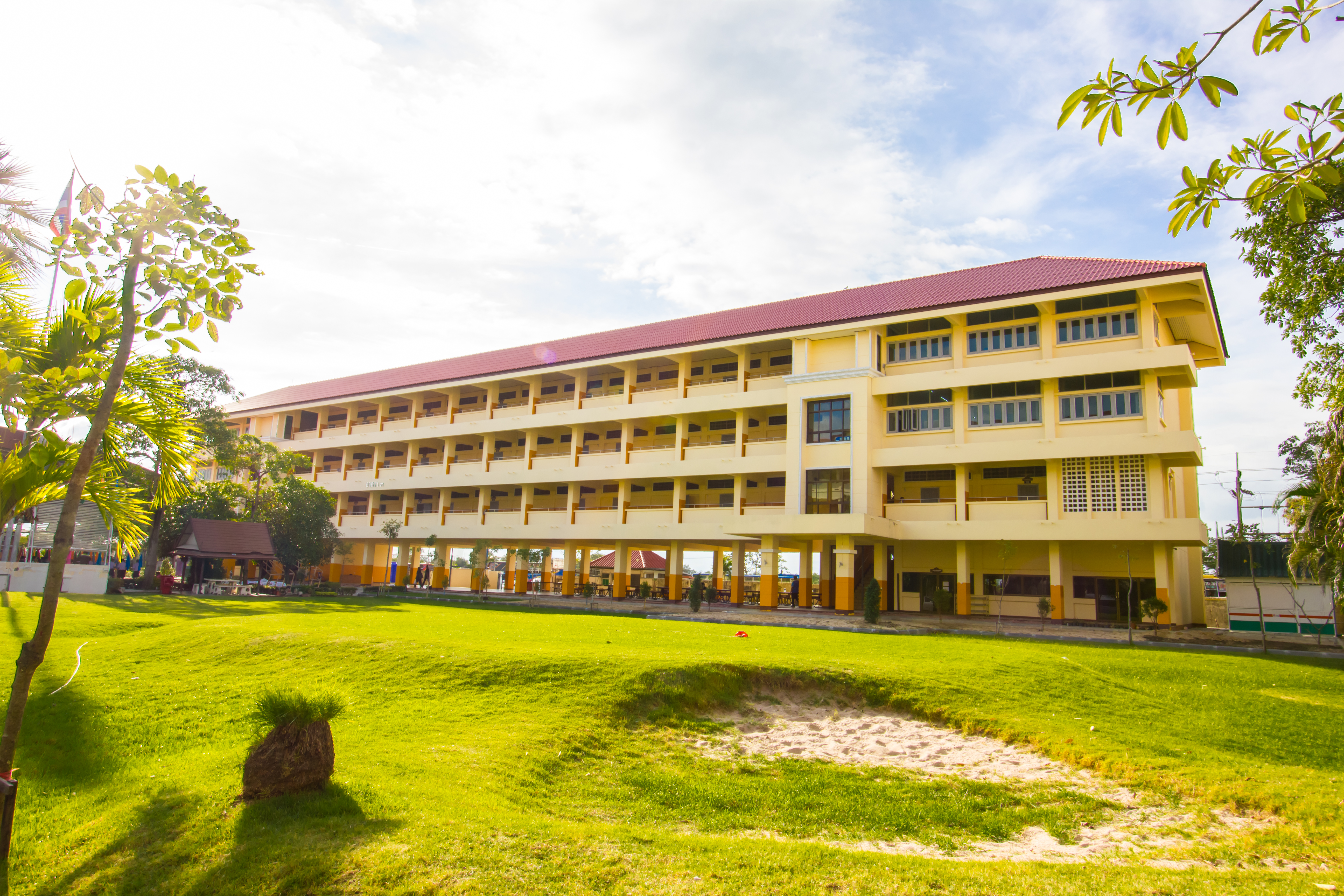 อาคาร ๓ ของ รร.บ.ด.๔